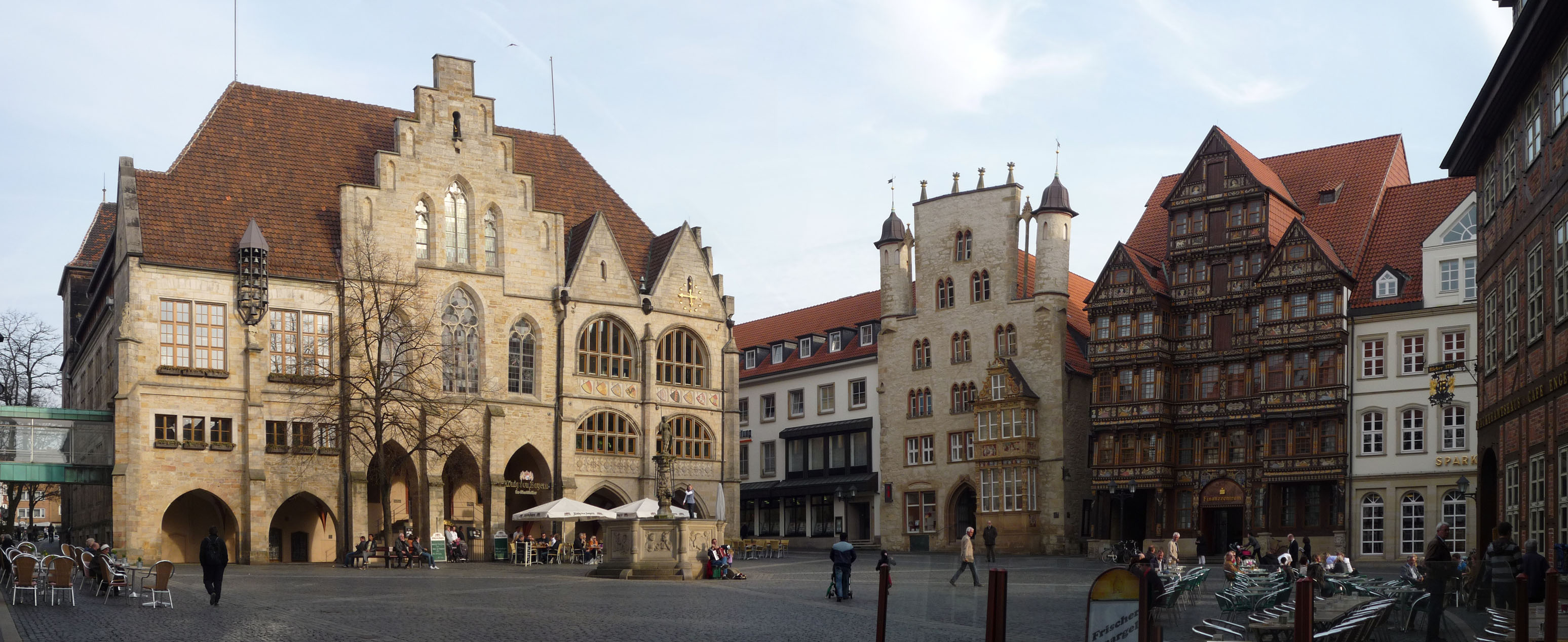 Marktplatz mit Rathaus, Tempelhaus, Wedekindhaus, Lüntzelhaus, Bäckeramtshaus. Vor dem Rathaus steht der Volkerbrunnen. Akkordeonspieler: Volker Hoffmann